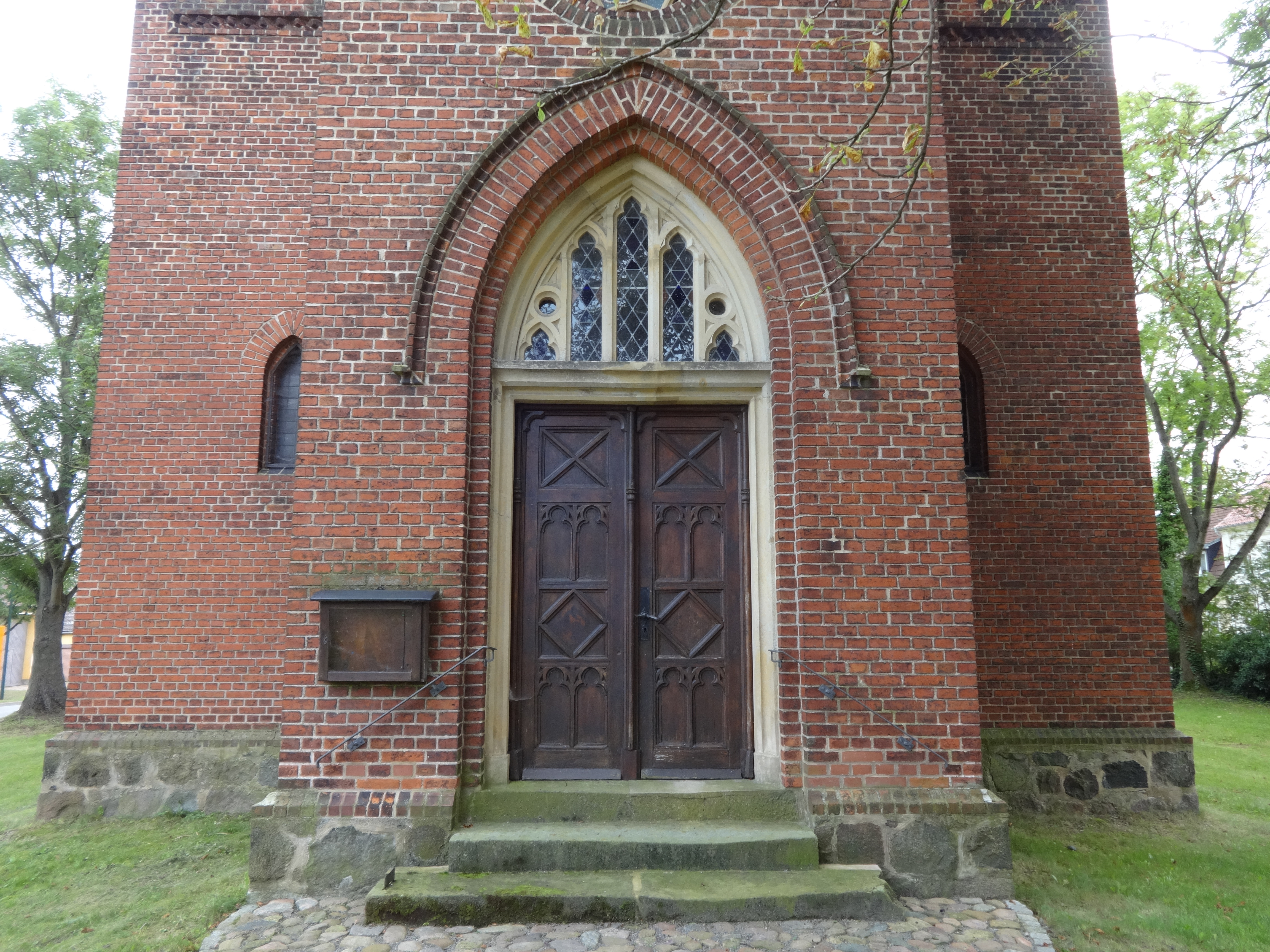 Die neogotische Saalkirche in Grüna (Stadt Jüterbog) entstand in den Jahren 1873 und1874 auf dem Fundament eines mittelalterlichen Vorgängerbaus. Die Kirchenausstattung ist bauzeitlich.